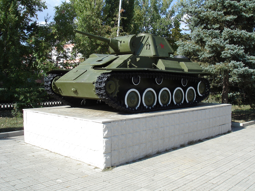 Танк Т-70 в Каменске-Шахтинском